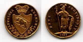 Dublone Bern 18. Jahrhundert.